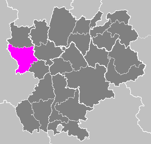 Maps of arrondissements and cantons of France: Arrondissement de Montbrison.PNG (Région Rhône-Alpes)